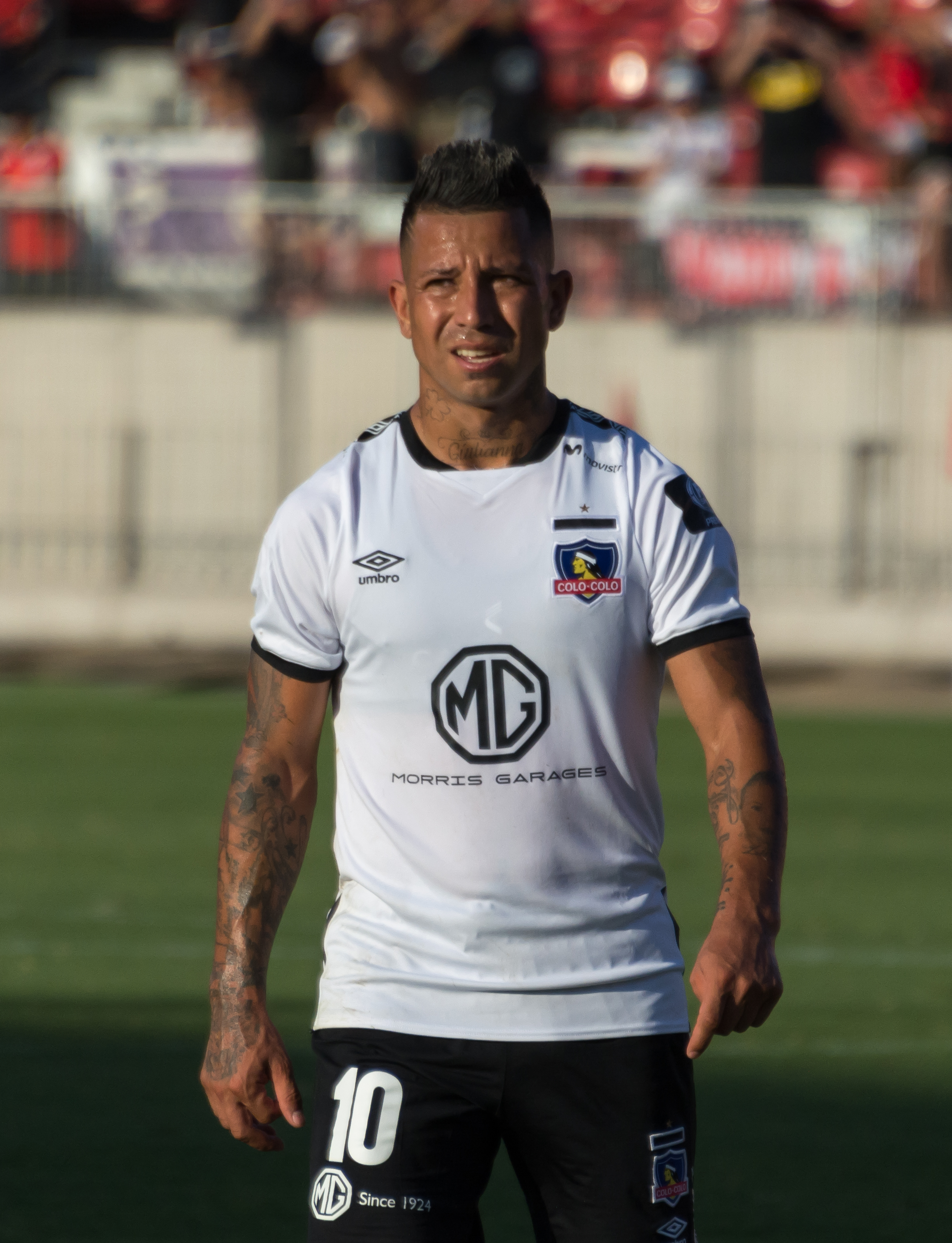 Audax Italiano v Colo-Colo, Estadio Nacional, Ñuñoa, Santiago, Región Metropolitana, Chile